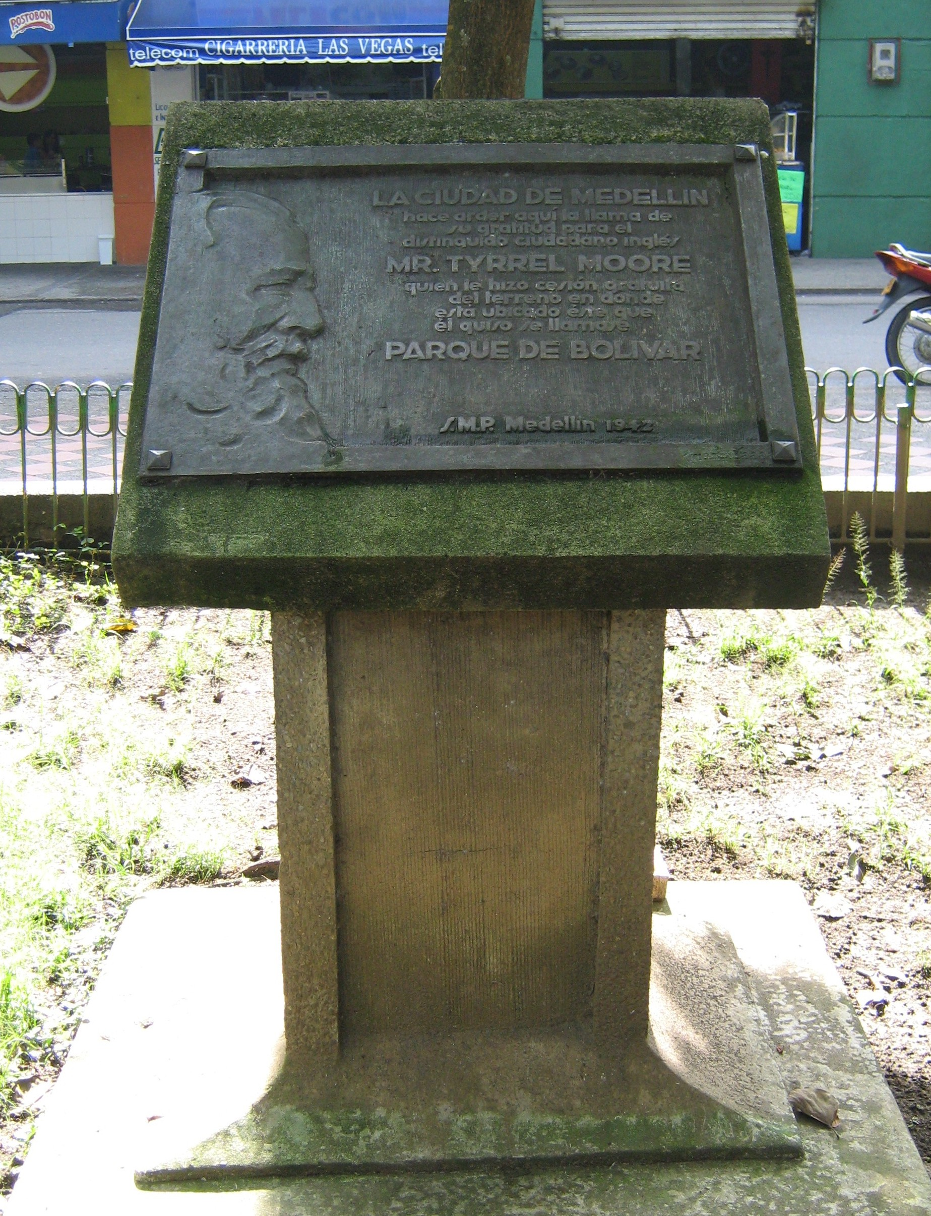 Placa de James Tyrrel Moore en el Parque de Bolívar. Medellín, Colombia.